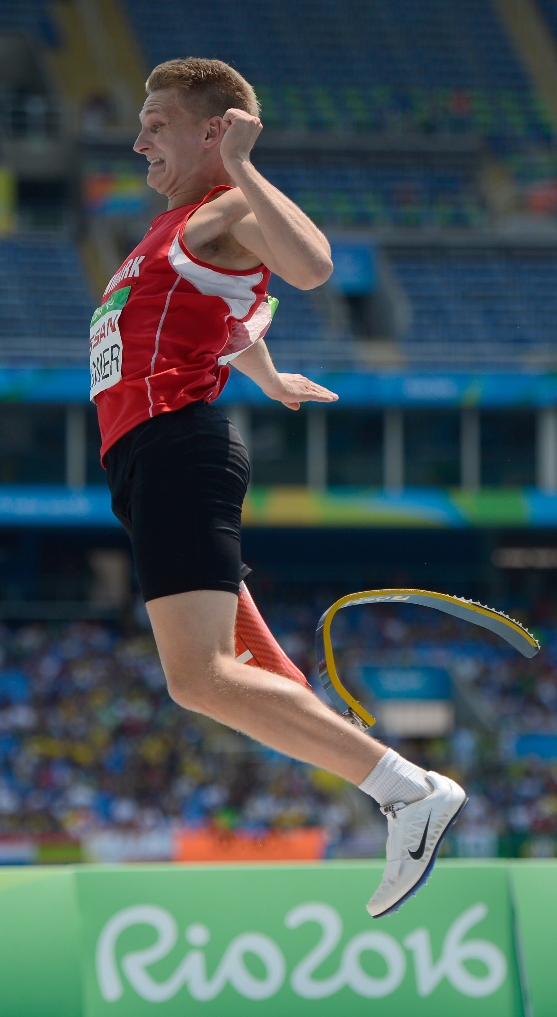 Rio de Janeiro - Daniel Wagner da Dinamarca leva bronze no salto em distância T42 masculino nos Jogos Paralímpicos Rio 2016 (Fernando Frazão/Agência Brasil)